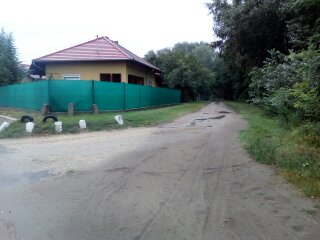 Hetényegyháza alsó megálló (-1974)